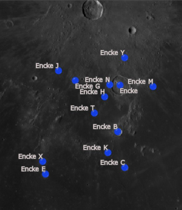 Cráter lunar Encke. Cráteres satélite. (Imagen LROC)